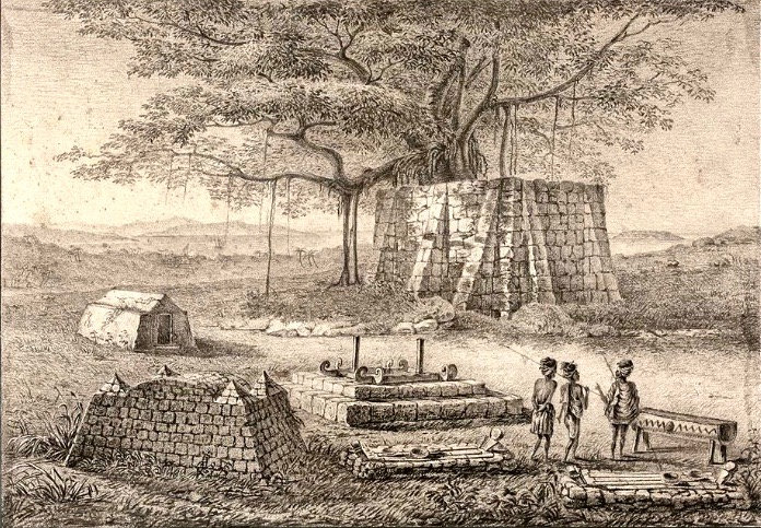 Charles-Alexandre Lesueur (1778–1846): Friedhof in Kupang, Westtimor. In Kupang errichtete Nicolas Baudon (1754–1803) ein Grab für den dort verstorbenen Chefgärtner seiner Australien-Expedition Anselm Riedle, französisch Anselme Riedlé (1765–1801) aus Irsee im Allgäu (das auf der Zeichnung nicht zu sehen ist). Feder, Tusche, Bleistift, 15 x 21 cm. Auktion deutscherandhackett, Melbourne, 2018.